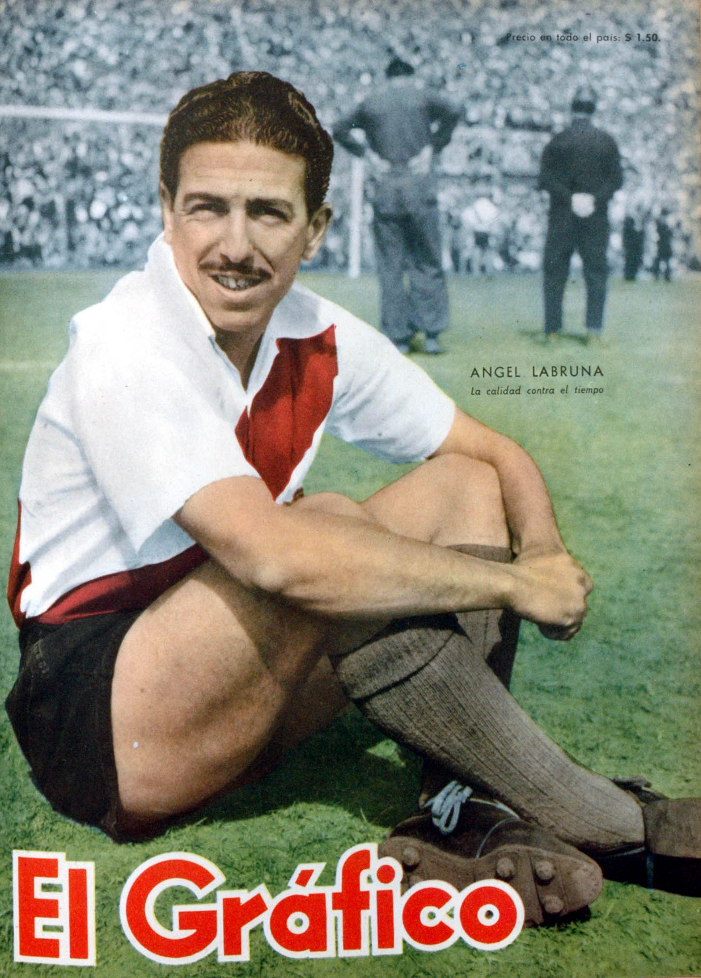 El Grafico del 08 de Abril de 1955. Edicion 1860